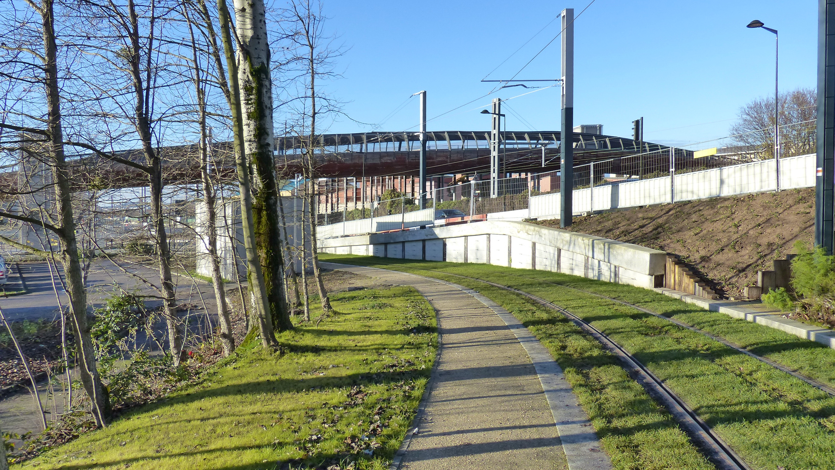 La voie de service de la ligne T8 en forte rampe, reliant le terminus de Villetaneuse-Unicersité au site de maintenance et de remisage (SMR) de Villetaneuse